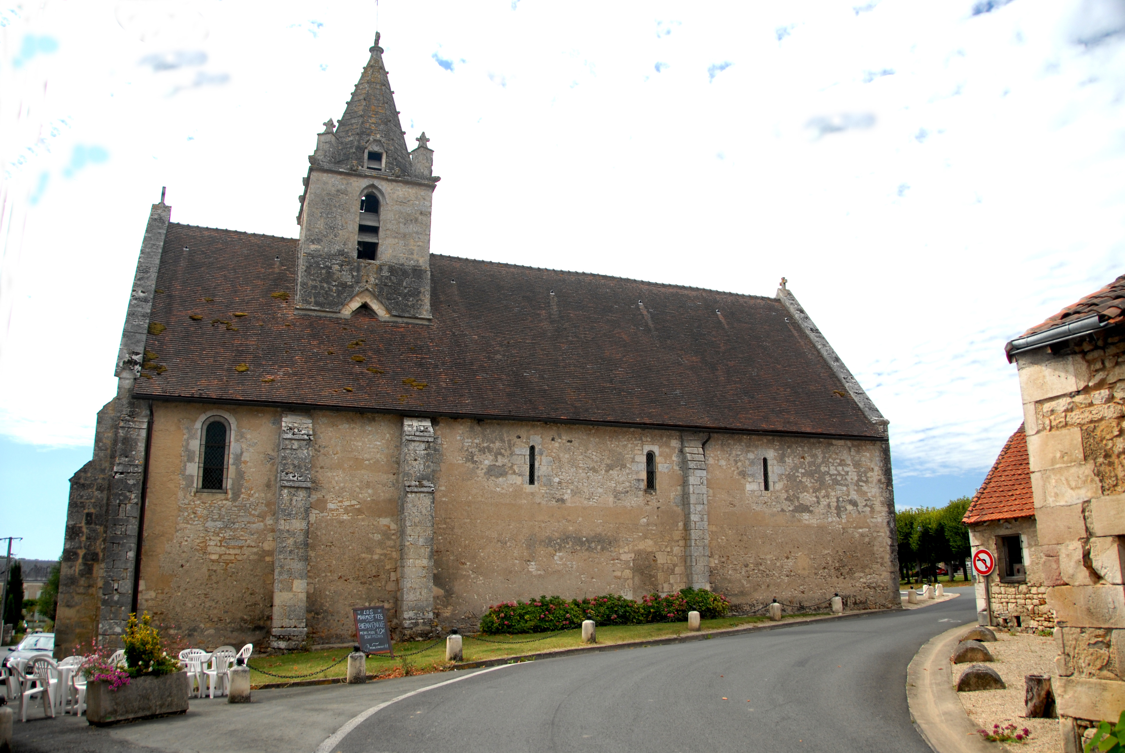 Kirche von N